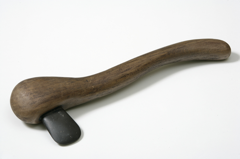 Ricostruzione di un'accetta con manico in legno e lama in pietra verde levigata (realizzazione di T. Centelli).